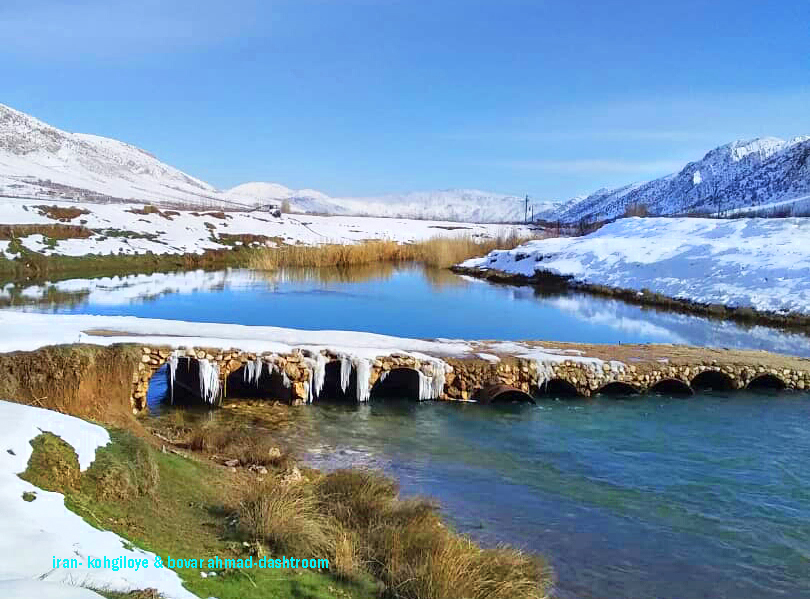 منطقه سردسیر دشتروم درفصل زمستان این منطقه در فاصله 17 کیلومتری جنوب یاسوج در مسیر باسوج به بابامیدان واقع شده.